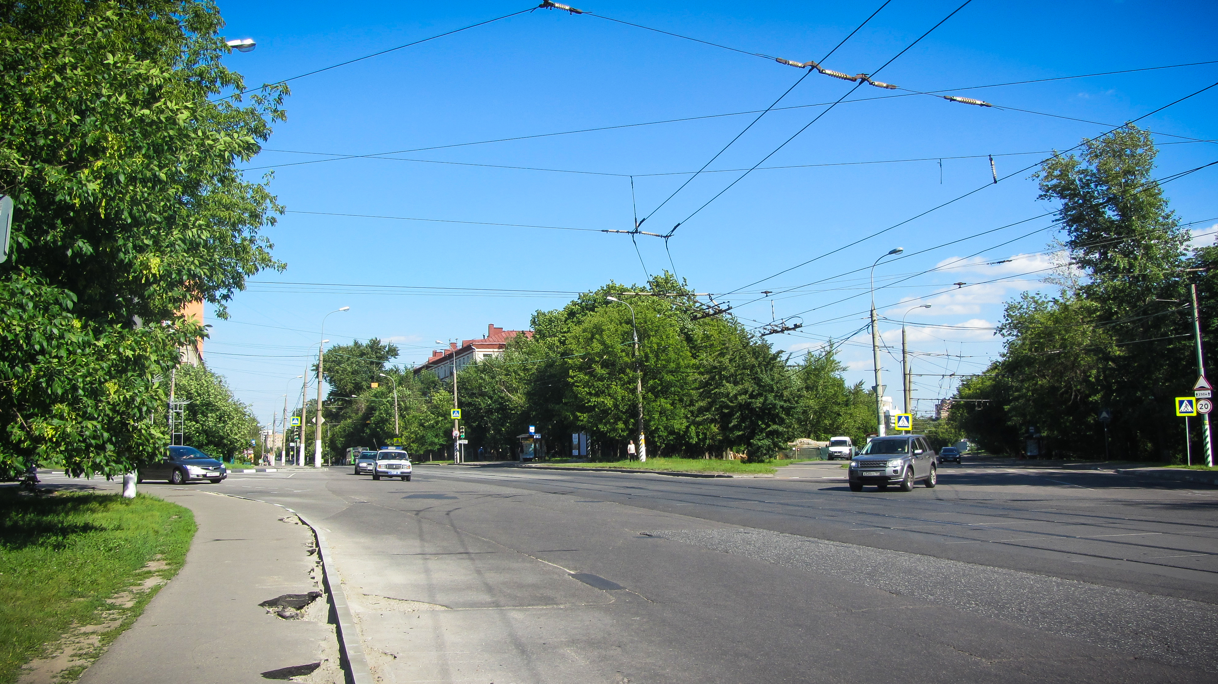 Слева направо: ул. Высокая, ул. Нагатинская, ул. Садовники